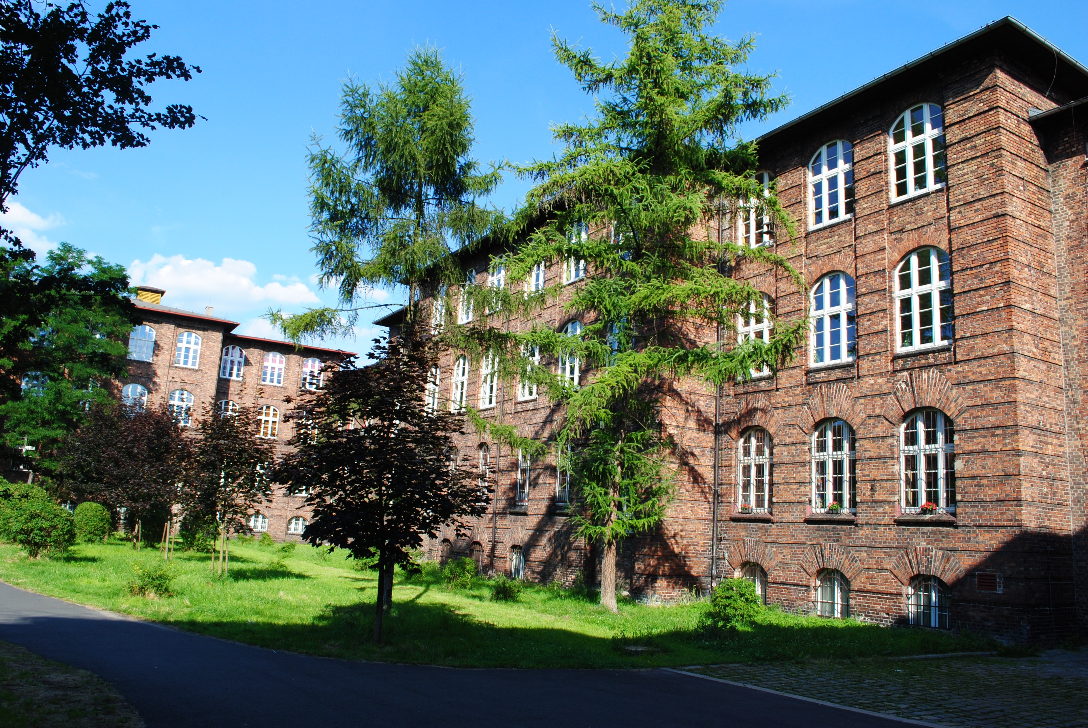 Katowice - Janów-Nikiszowiec. Szkoła Podstawowa nr 53 im. S. Żeromskiego